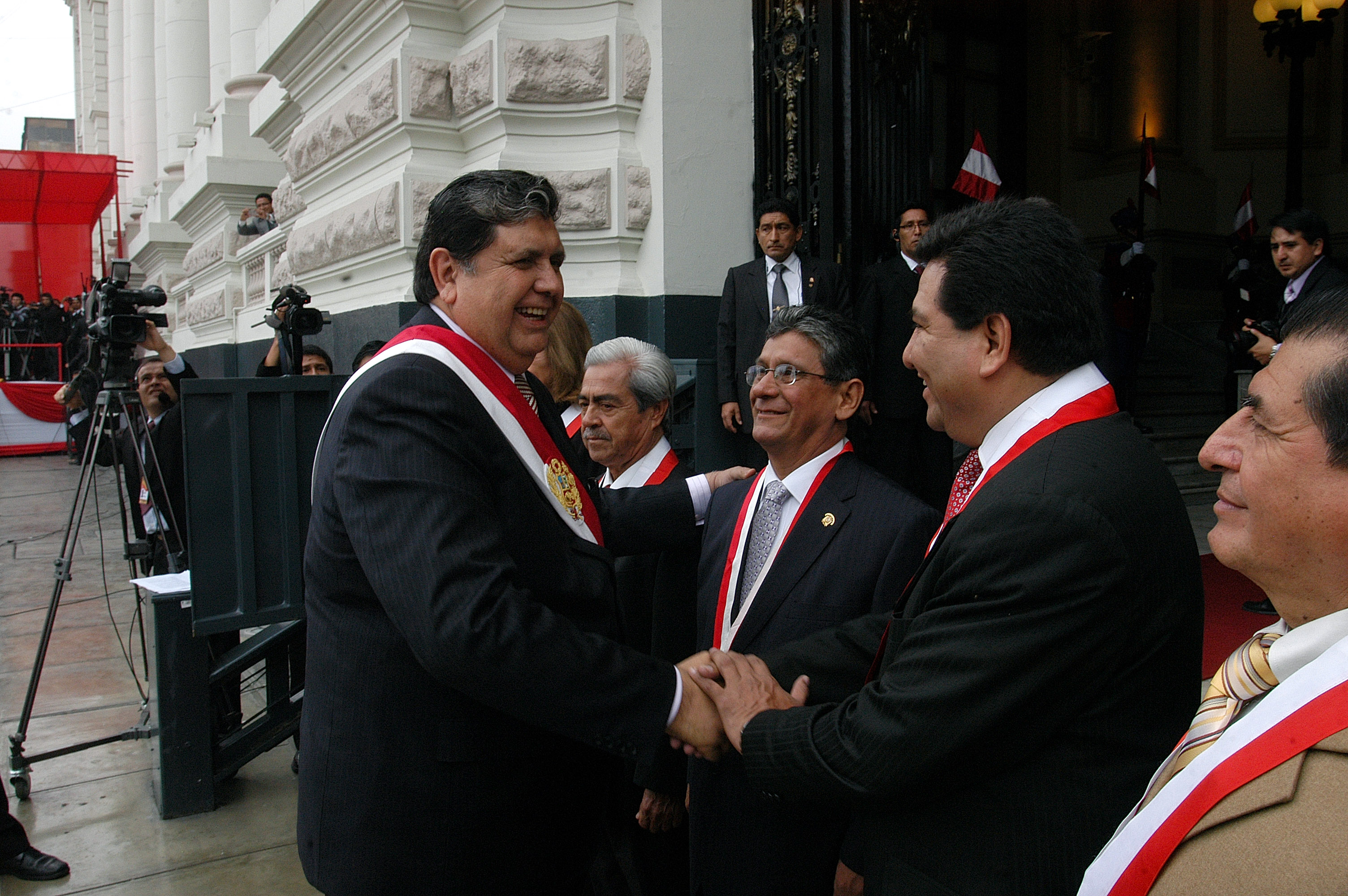 El jefe del Estado, Alan García Pérez, es saludado por los legisladores miembros de la Comisión de Recibo designada para darle la bienvenida a su llegada al Palacio Legislativo.